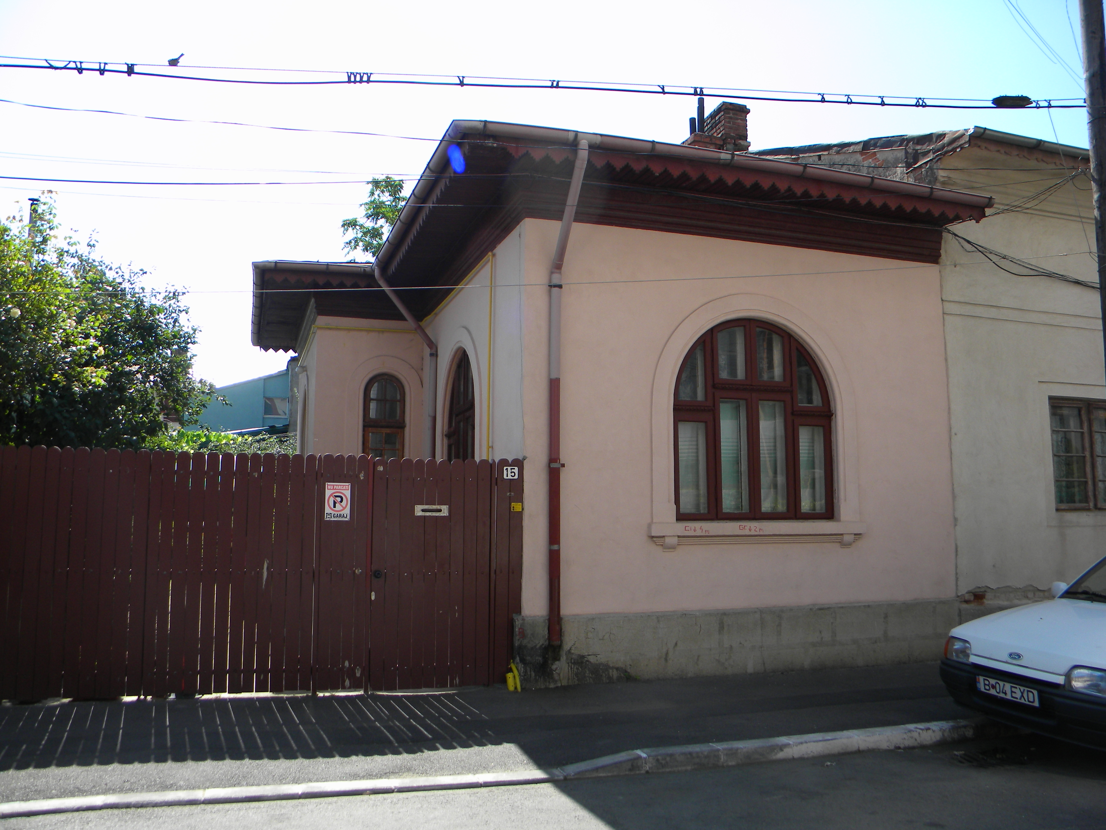 Bucuresti, Romania. Casa pe Str. Constantin Nottara nr. 15. B-II-m-B-19297